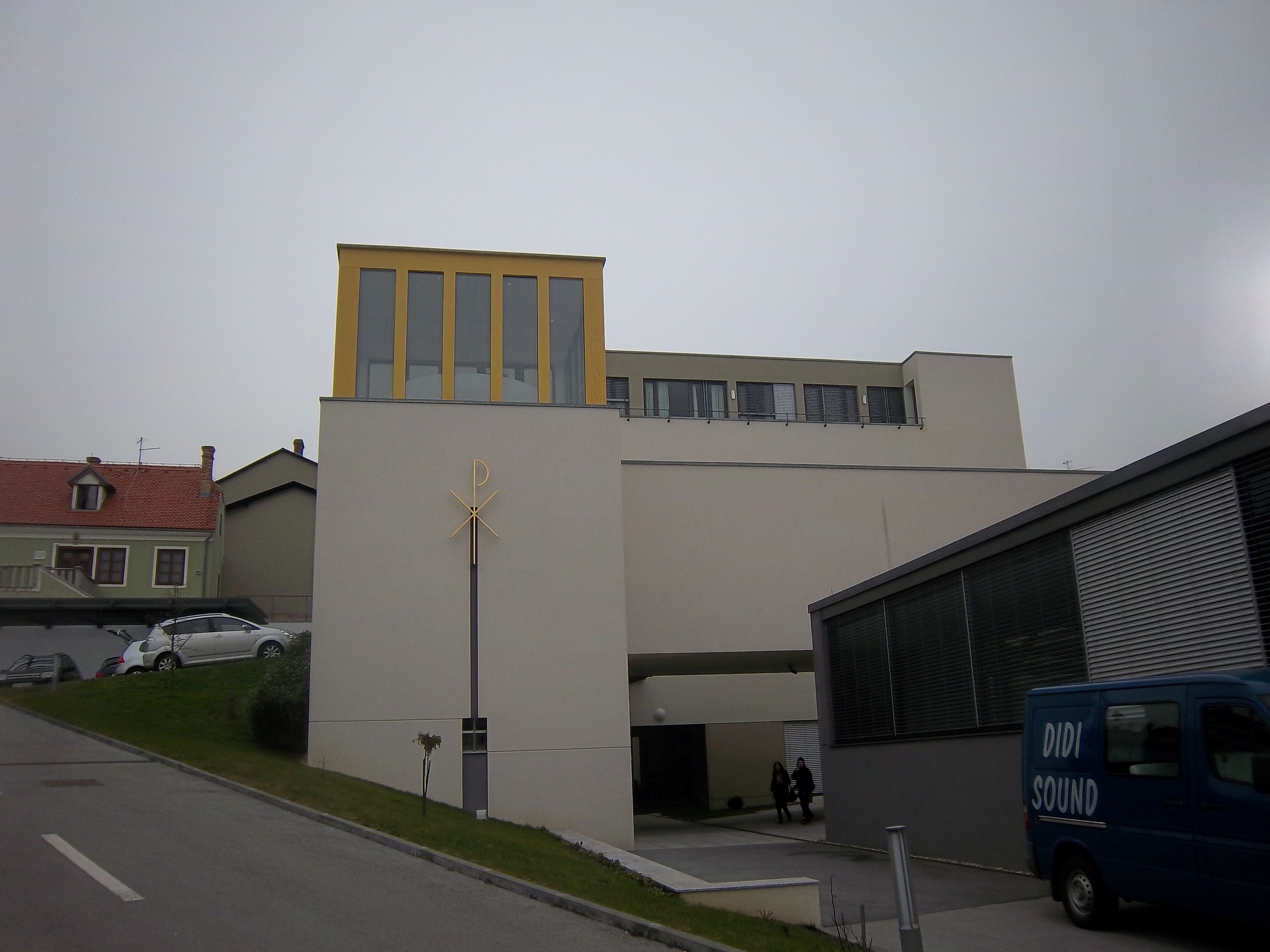 plan nove gimnazije na Svetom duhu u Zagrebu